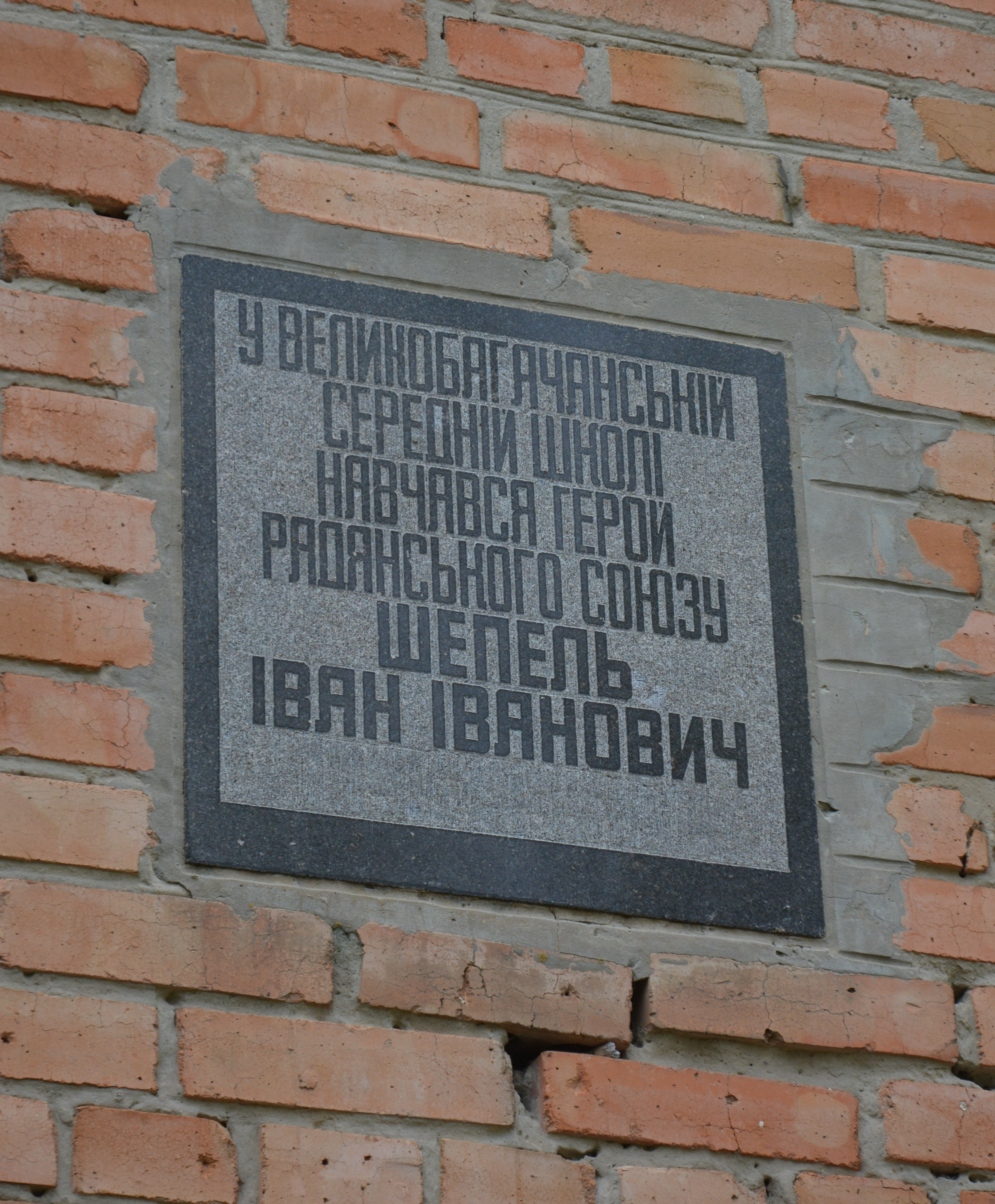 Меморіальна дошка на честь Героя Радянського Союзу І.І.Шепеля, смт В.Багачка, школа